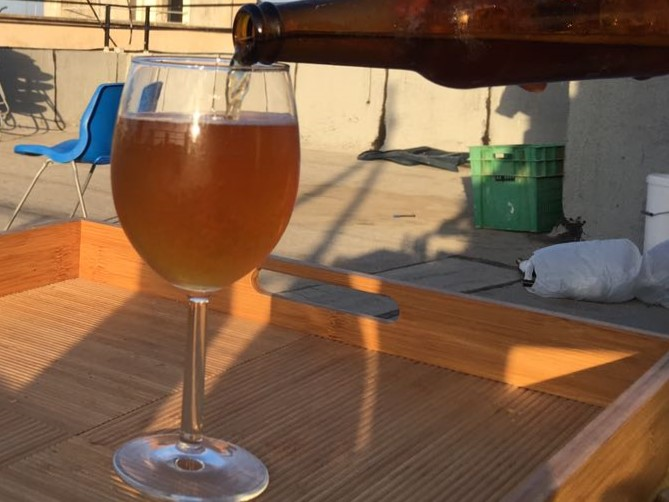 אייל בלונד מפוקס יותר